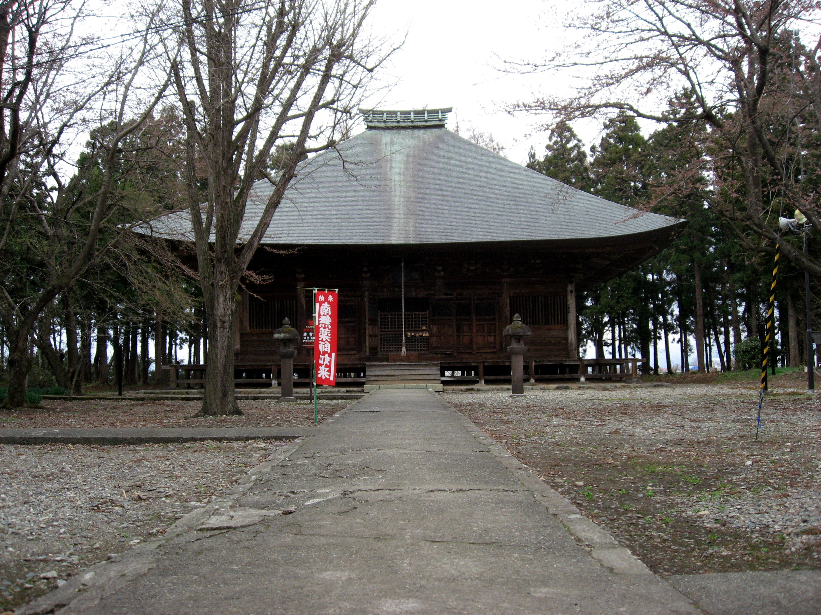 勝常寺 薬師堂 （福島県湯川村）